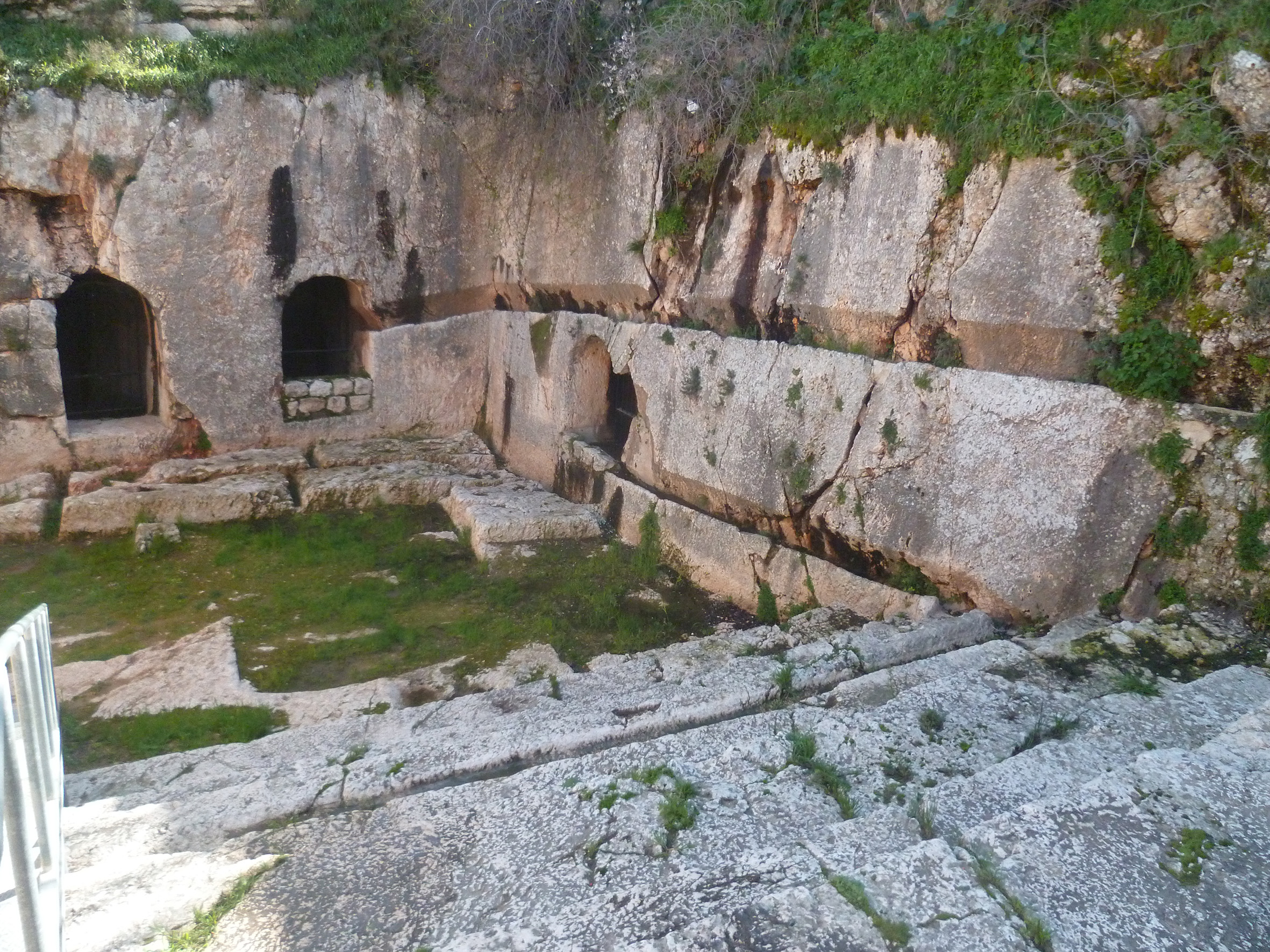 Deux importants canaux, creusés dans la paroi latérale de l'escalier, permettent d'acheminer les eaux de pluies vers les citernes-bains rituels. Ce système, antique, est toujours fonctionnel.